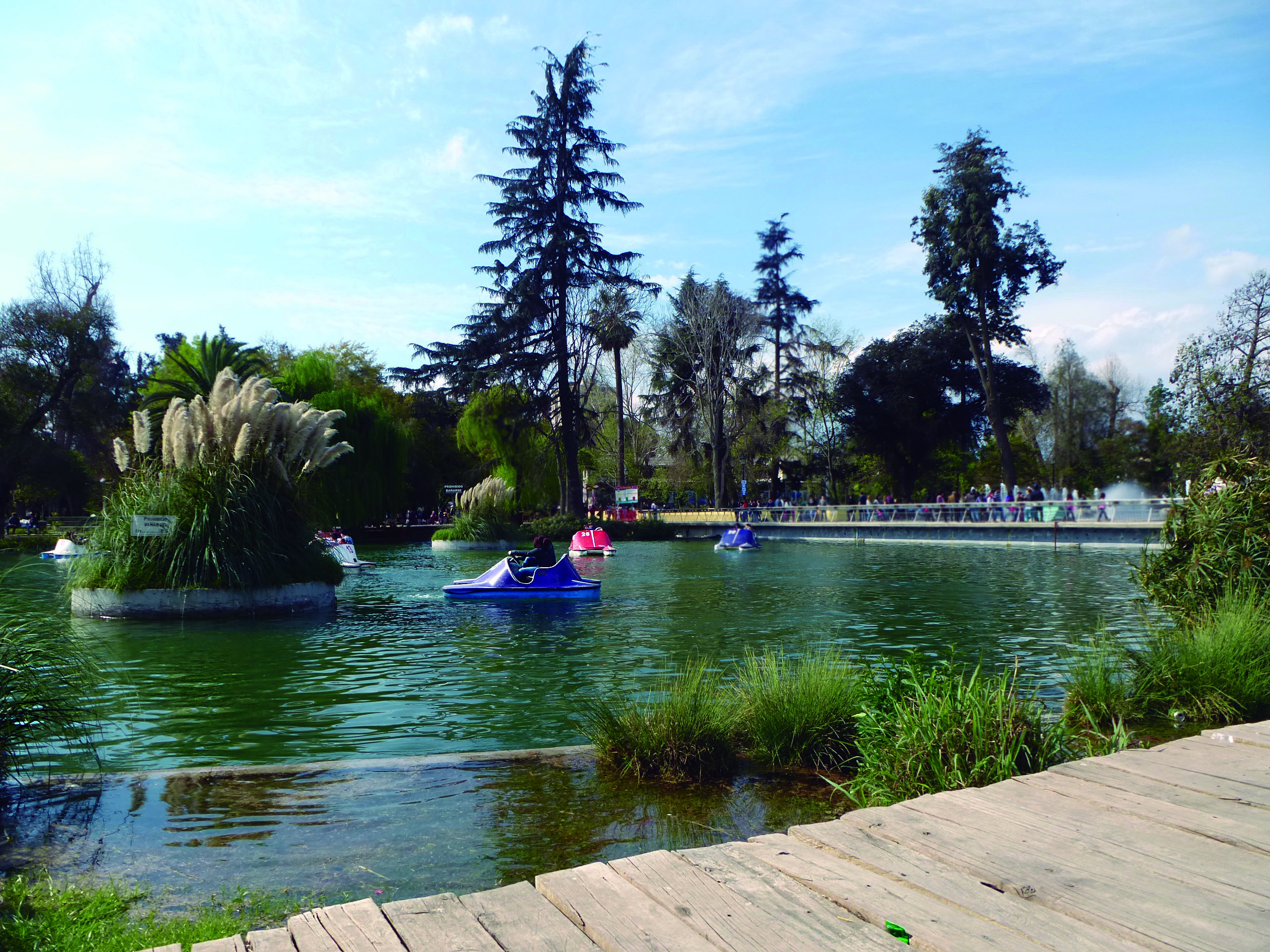 Parque Quinta Normal This is a photo of a national monument in Chile: 136